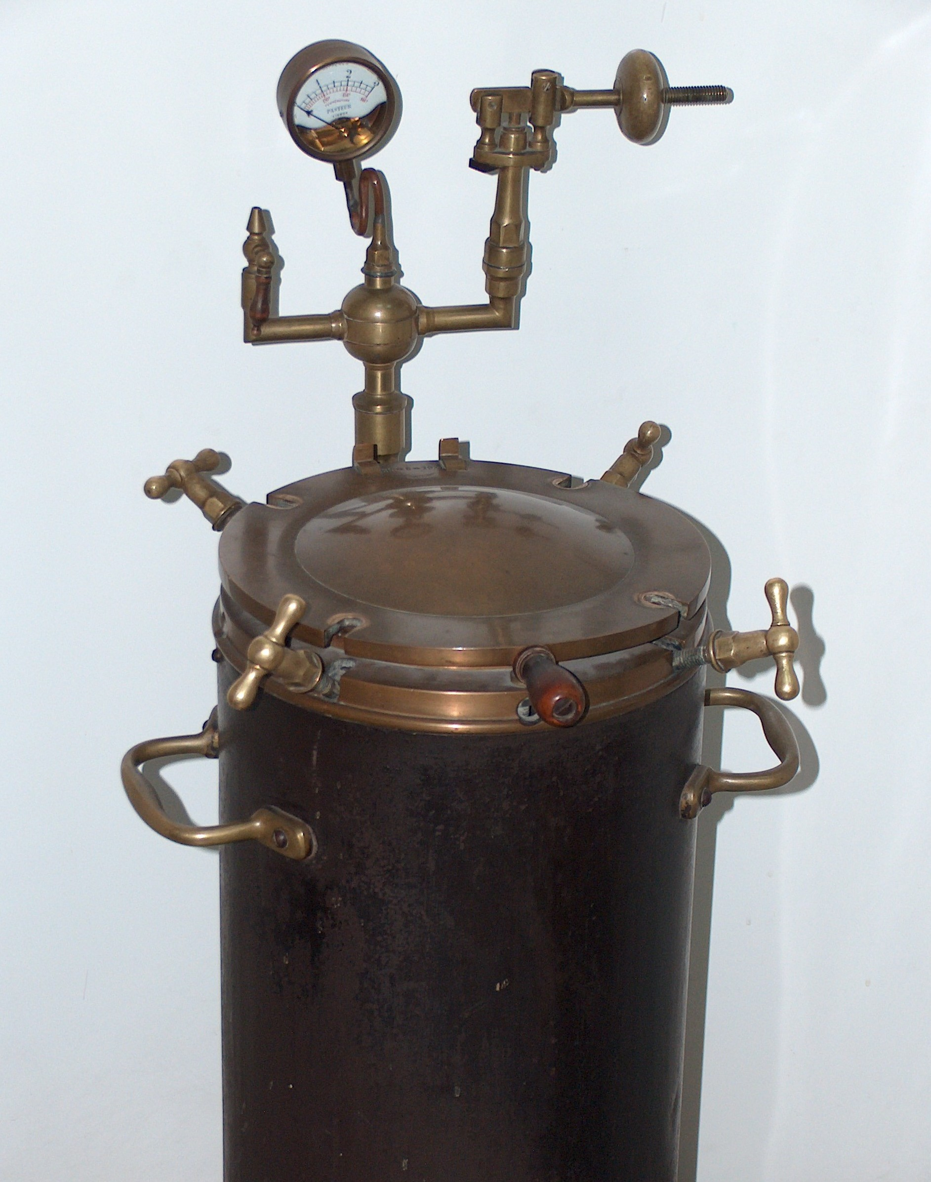 Descrição Autoclave de paredes simples. Fonte Carregada pelo autor Autor João Carvalho Licença